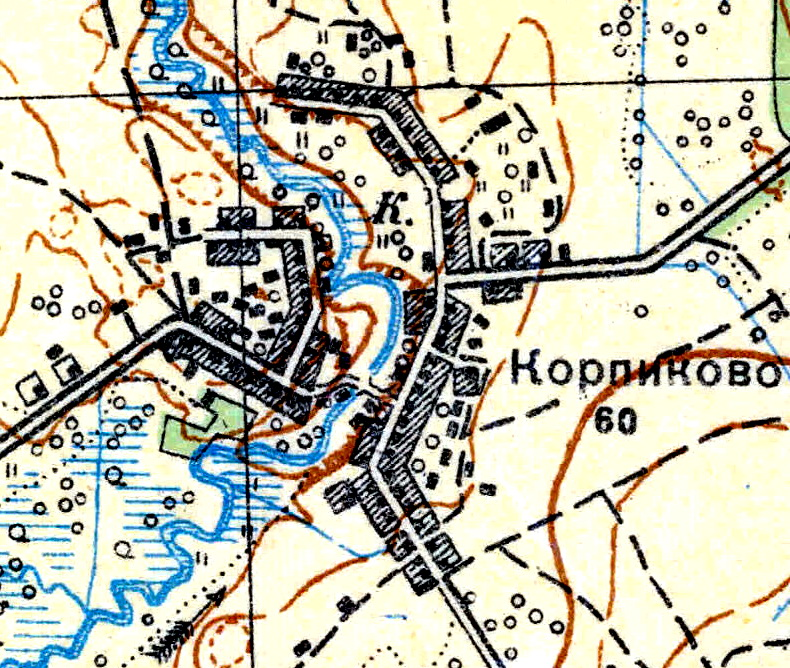 Топографическая карта Ленинградской области, квадрат О-36-13-А-в (Красногвардейск), деревня Корпиково